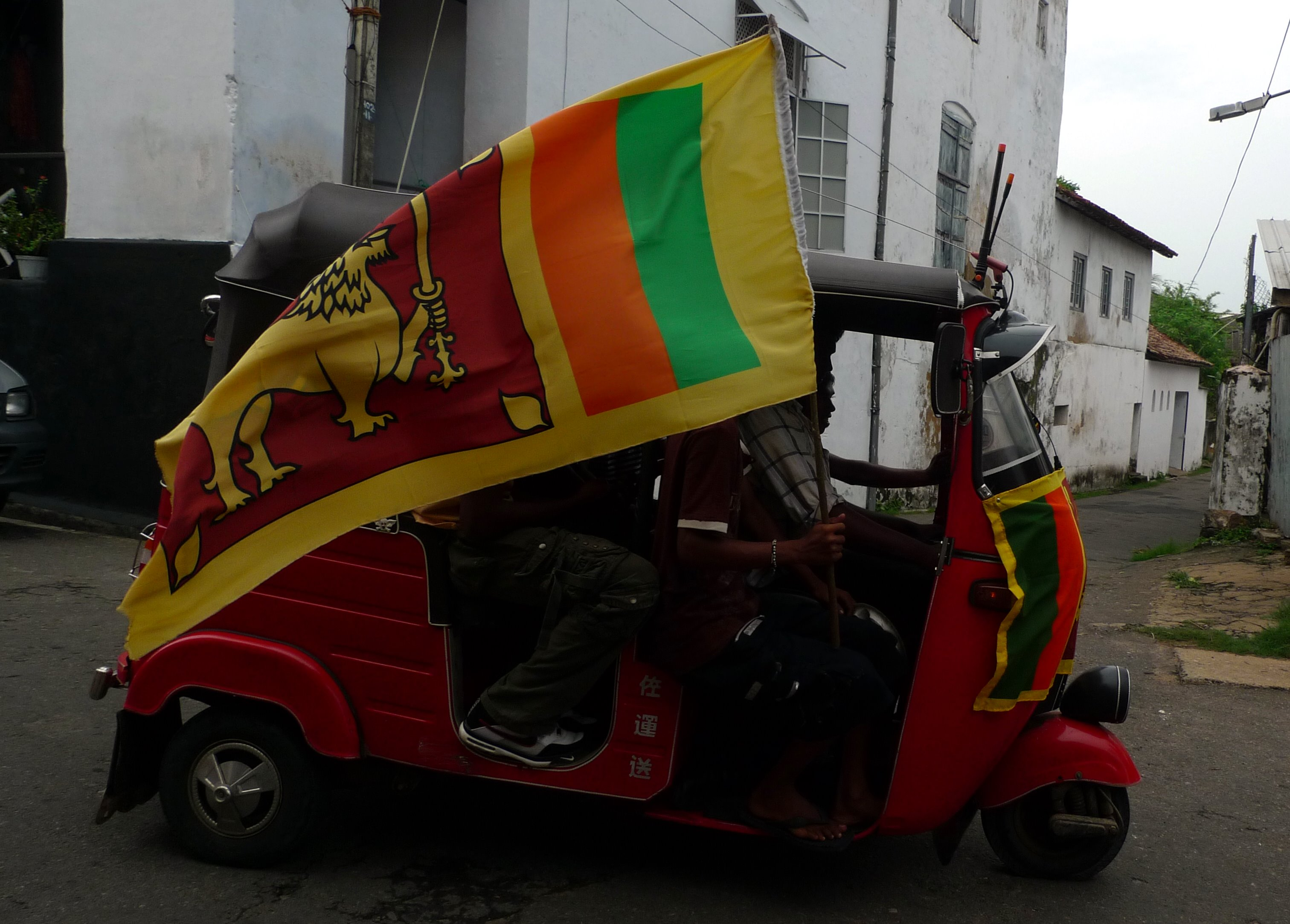 Sri Lanka Flag Galle Fort